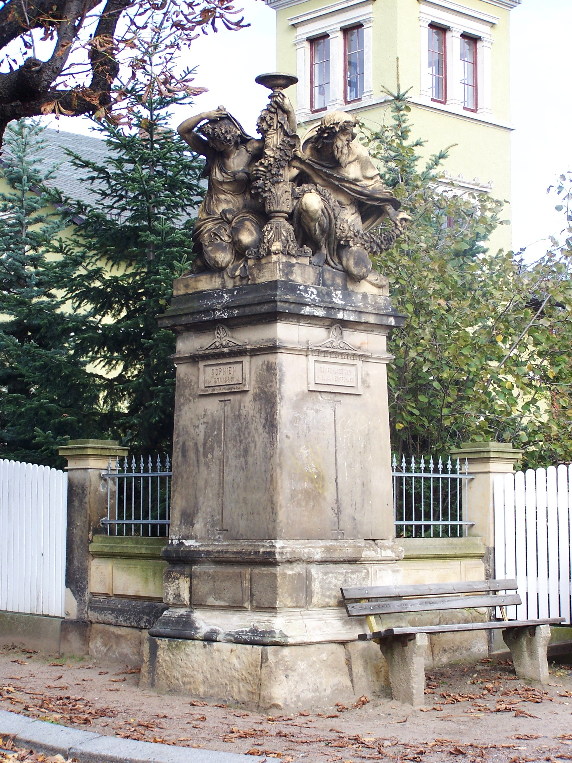 Figurengruppe in Radebeul, Eduard-Bilz-Straße